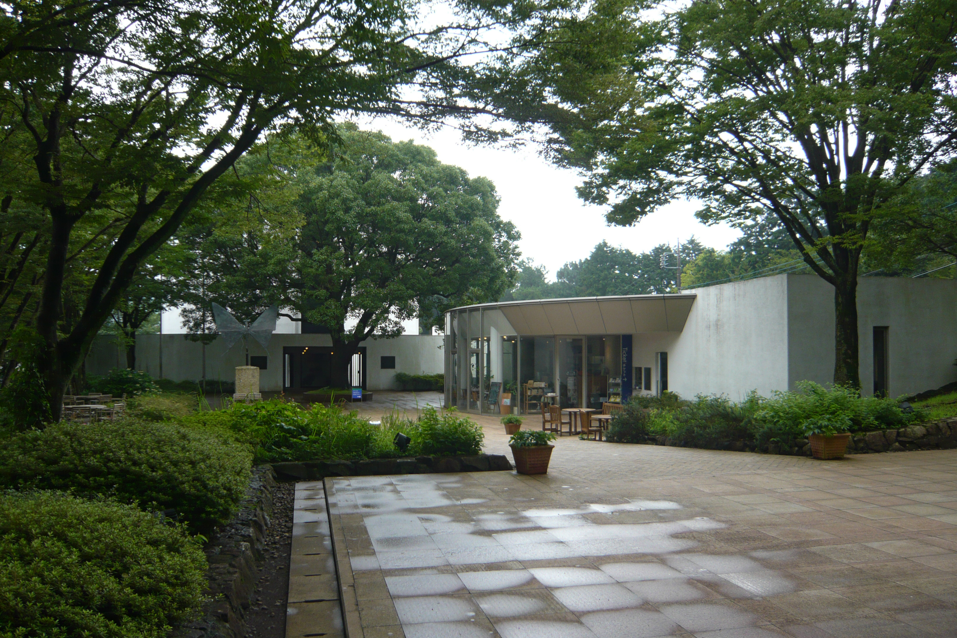 Clematis_no_Oka (クレマチスの丘), Nagaizumi, Shizuoka prefecture, Japan